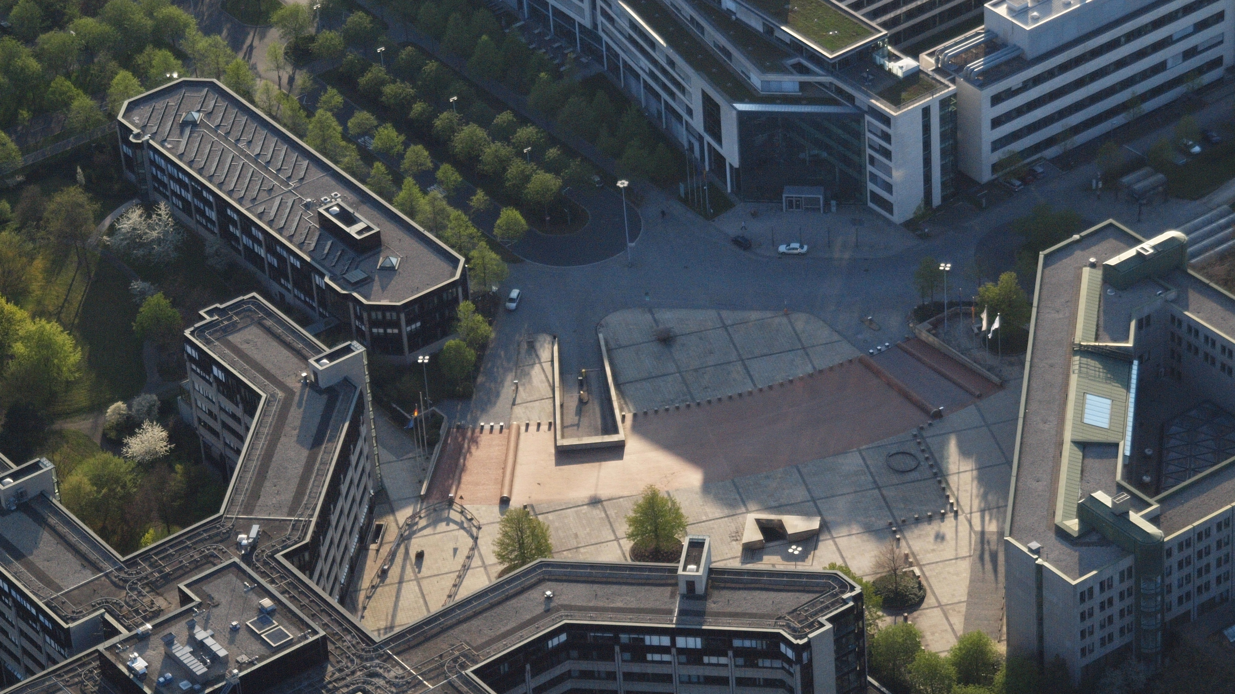 Robert-Schuman-Platz in Bonn, Ortsteil Hochkreuz: Luftaufnahme